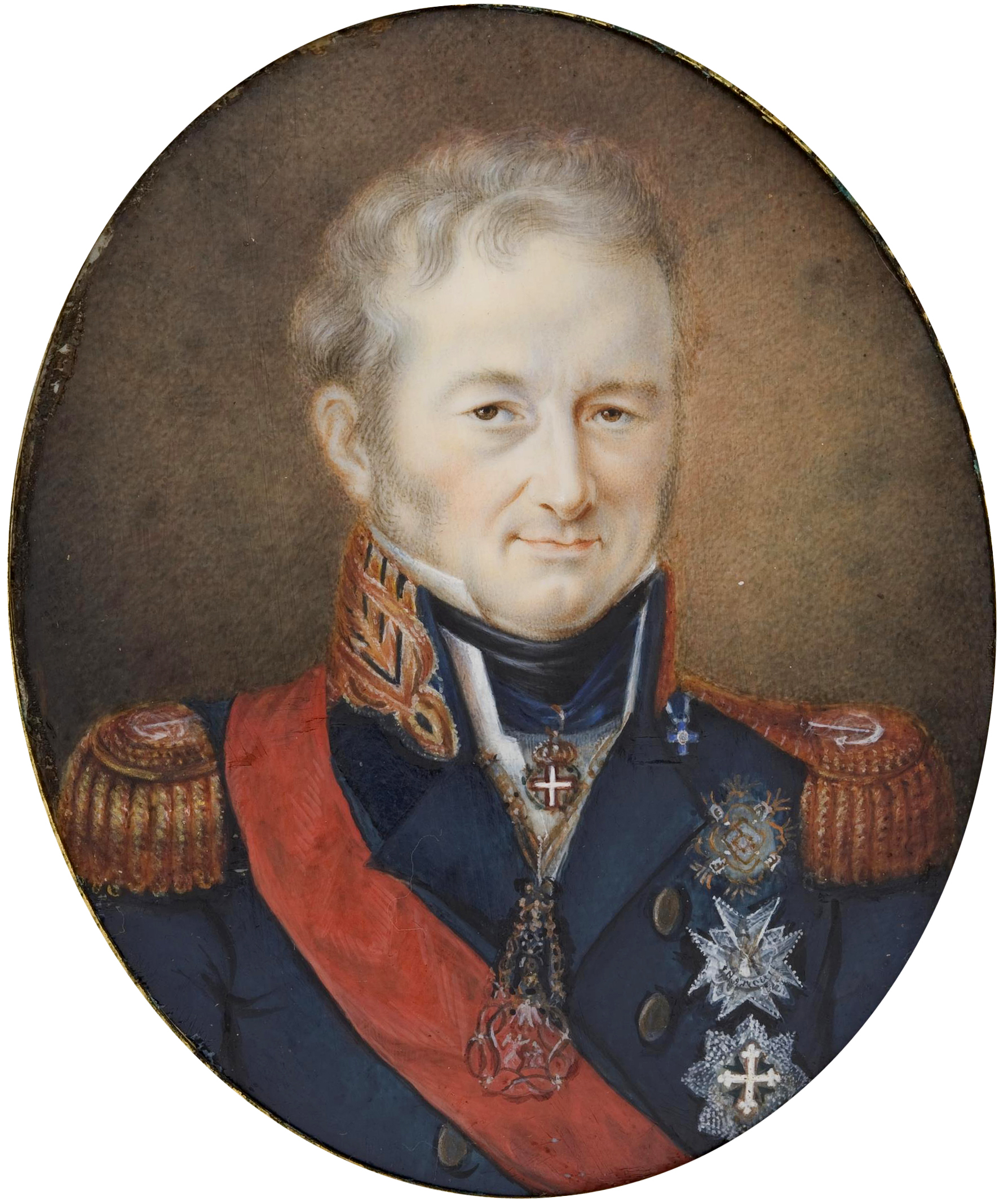 Carlo Felice Giuseppe Maria, duque de Saboya, Piamonte y Aosta, rey de Cerdeña desde 1821 a 1831, nació en el Palacio Real de Turín el 6 de abril de 1765, hijo de Víctor Amadeo III de Cerdeña (1726-1796) y de María Antonia de Borbón, infanta de España (1729-1785). Se casó por poderes en Palermo el 7 de marzo de 1807, matrimonio ratificado en Turín el 6 de abril, con la princesa María Cristina de Borbón (1779-1849), hija del rey Fernando I de las Dos Sicilias y de la archiduquesa María Carolina de Austria. Murió, sin herederos, en su ciudad natal el 27 de abril de 1831. La presente miniatura debe fecharse en 1821, durante el primer año de su reinado, pues entre las condecoraciones con las que está representado; orden de la Annunzziata, orden de San Maurizio y Lazzaro, orden de San Gennaro, orden del mérito militar y civil de Saboya; falta el Toisón de Oro, que le fue concedido por el emperador Francisco II en 1822. El anónimo pintor debe ser relacionado con el entorno de Jean-Baptiste Isabey. Siguió el modelo creado por el maestro francés para las miniaturas del periodo de la Restauración (1815-30) y que estableció durante su estancia en Viena, entre 1812 y 1815, cuando, comisionado por Talleyrand, se convirtió en el pintor oficial del Congreso. Este tipo de retratos, de cierto heroísmo, se extendió rápidamente a Inglaterra y a toda Europa (Texto extractado de Espinosa, Carmen: Las miniaturas en el Museo Nacional del Prado. Catálogo razonado, Madrid, Museo del Prado, 2011).